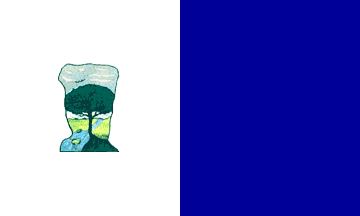 Bandera del Departamente Mercedes, Provincia de Corrientes, Argentina.